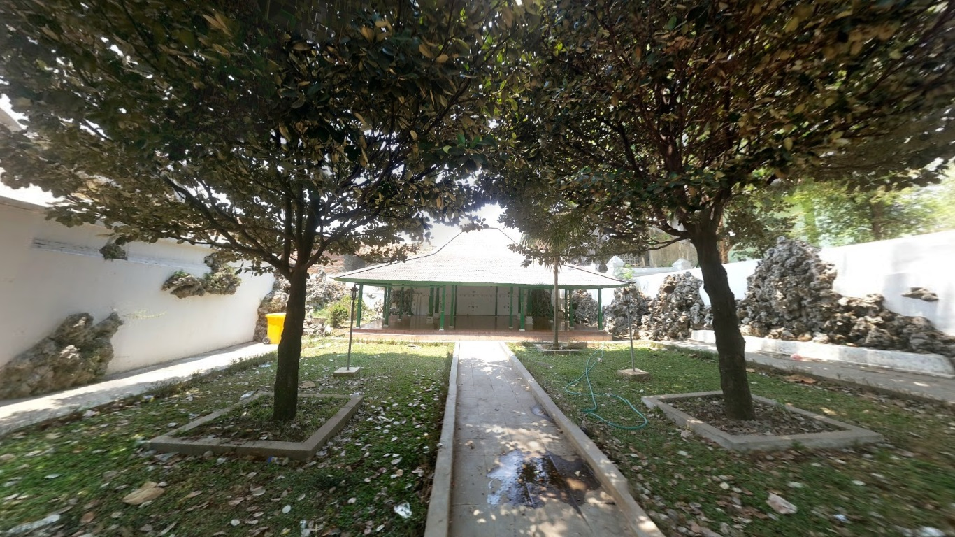 Bale Semirang kanoman